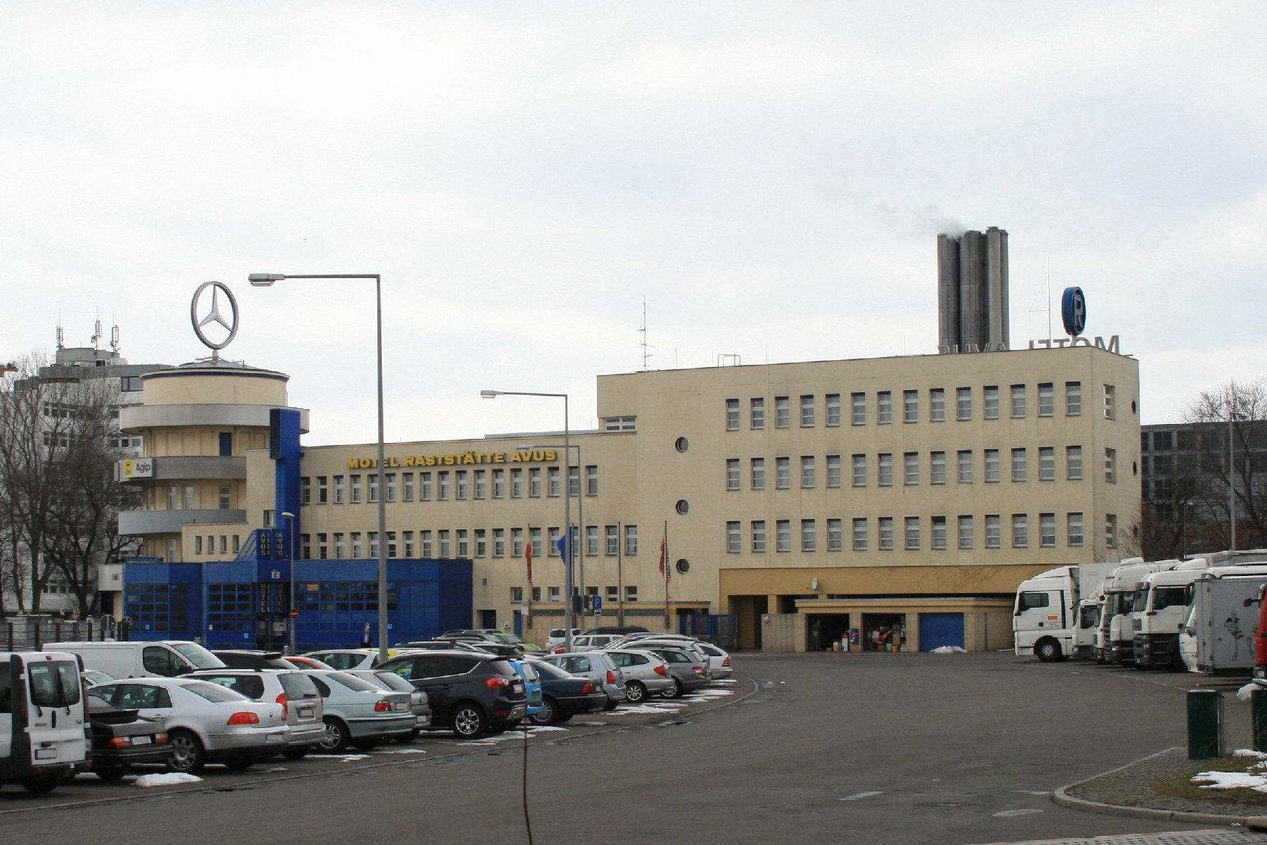 Berlin-Westend, Halenseestraße 47-51. Verwaltungsgebäude mit Gaststätte und Beobachtungsturm, heute Raststätte AVUS.